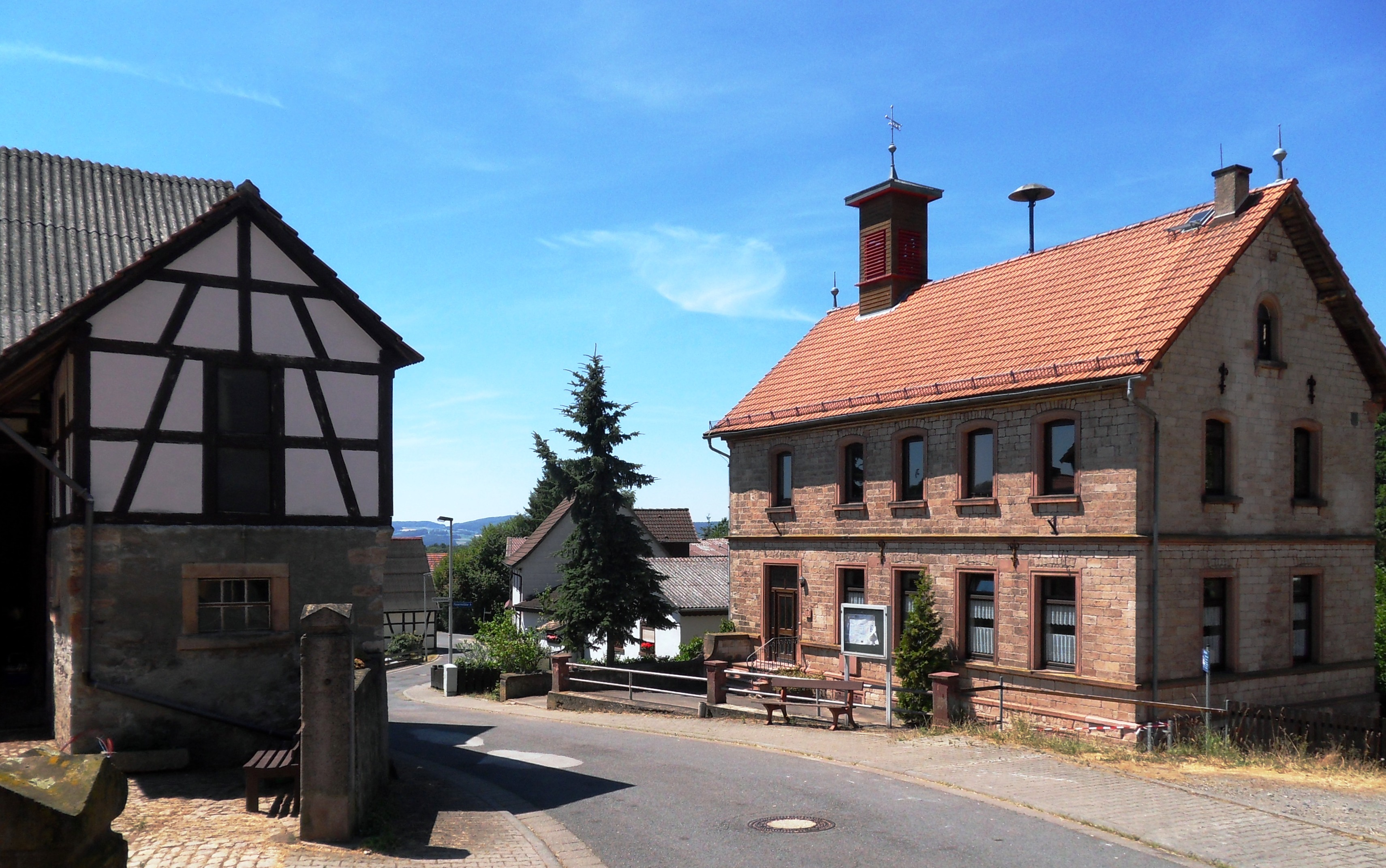 Alte Schule in der Kirchbrombacher Straße in Böllstein im Odenwald, Blick von Südosten